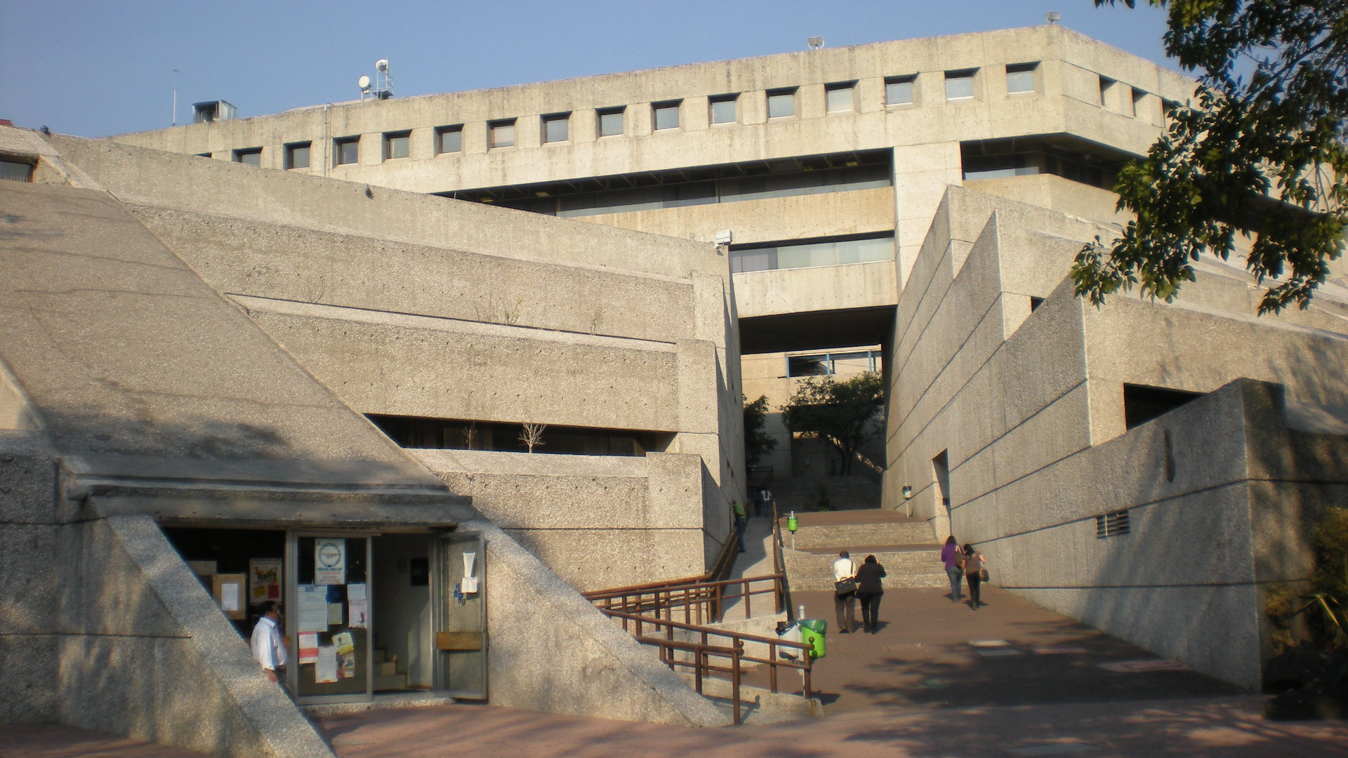 Entrada principal de la UPN Ajusco.